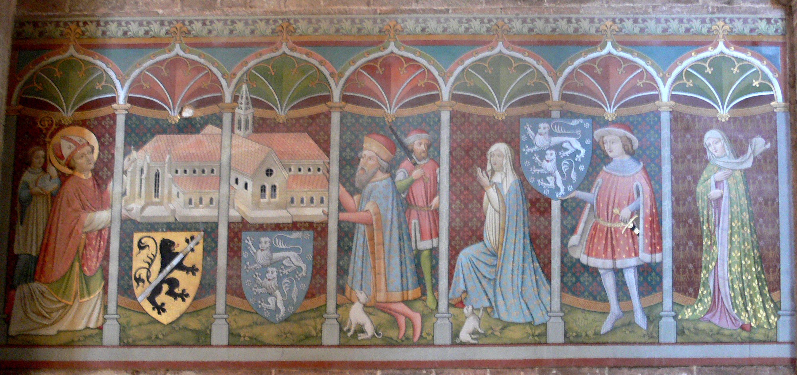 Heilsbronn, Landkreis Ansbach, Münster St. Marien und Jakobus Stifterbild, wohl spätes 15. Jh.; links Stifter Otto von Bamberg (ein Kaplan hält den Bischofsstab) und der erste Abt Graf Rapoto von Abenberg mit Kirchenmodell; hinter Rapoto ein Knappe; kniend seine Mechthild, Konrad d. J., dessen Frau Sophia.